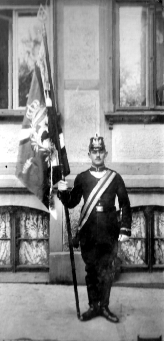 Fahne und Fahnenträger vor der Goslarer Domkaserne